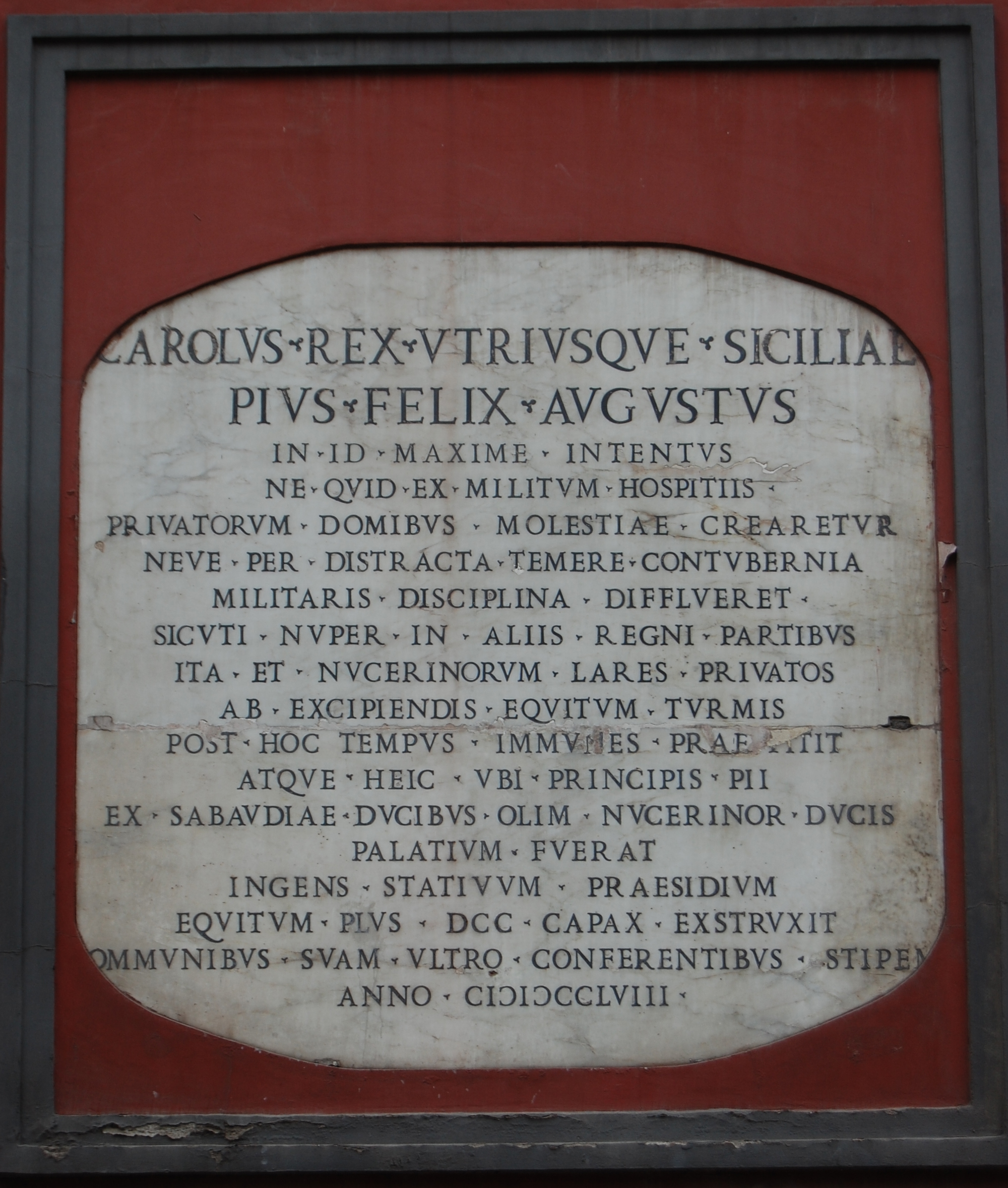 Caserma Tofano, via Solimena, Nocera Inferiore, iscrizione sulla facciata